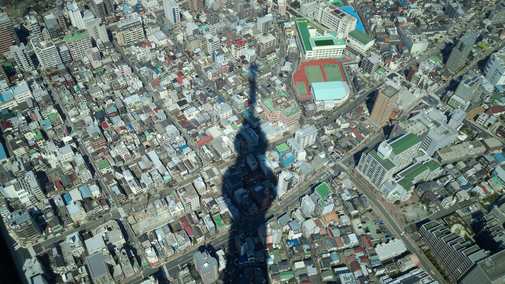 東京スカイツリーの影（2014年3月23日）